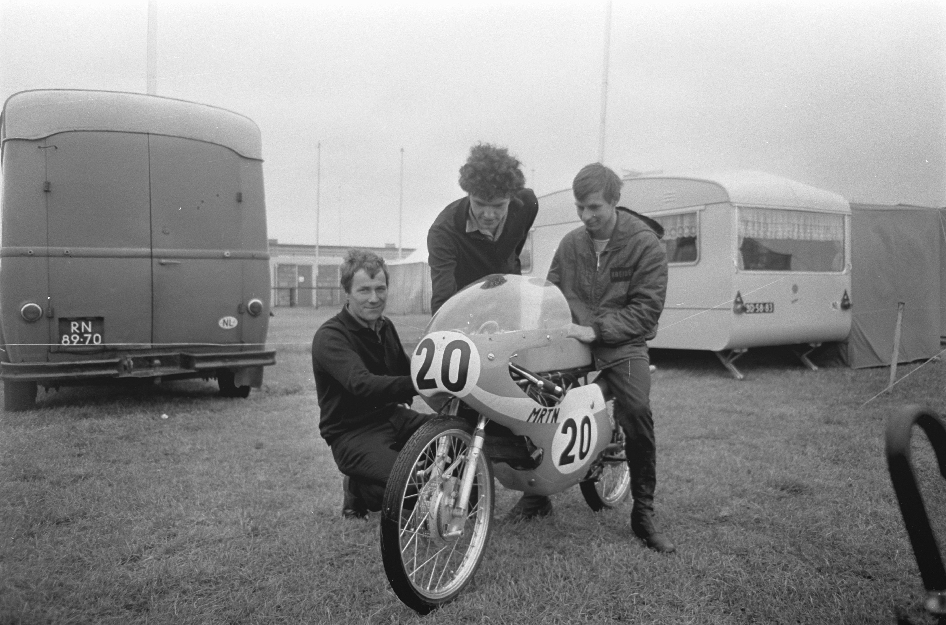 Collectie / Archief : Fotocollectie Anefo Reportage / Serie : TT Assen 1968 Beschrijving : TT te Assen. Training. Drie Nederlandse 50cc-rijders. op de motor (Jamathi) zit Aalt Toersen, staande in het midden Paul Lodewijkx. De zittende man links is Martin Mijwaart. Datum : 27 juni 1968 Locatie : Assen Trefwoorden : motorraces, motorsport, sport Persoonsnaam : Lodewijkx, Paul, Mijwaart, Martin, Toersen, Aalt Fotograaf : Nijs, Jac. de / Anefo Auteursrechthebbende : Nationaal Archief Materiaalsoort : Negatief (zwart/wit) Nummer archiefinventaris : bekijk toegang 2.24.01.05 Bestanddeelnummer : 921-4709 Reacties Geplaatst door Ton Kooyman op 15 mei 2009 - 01:40. Aalt Toersen reed in 1968 voor het team van Kreidler importeur Van Veen.